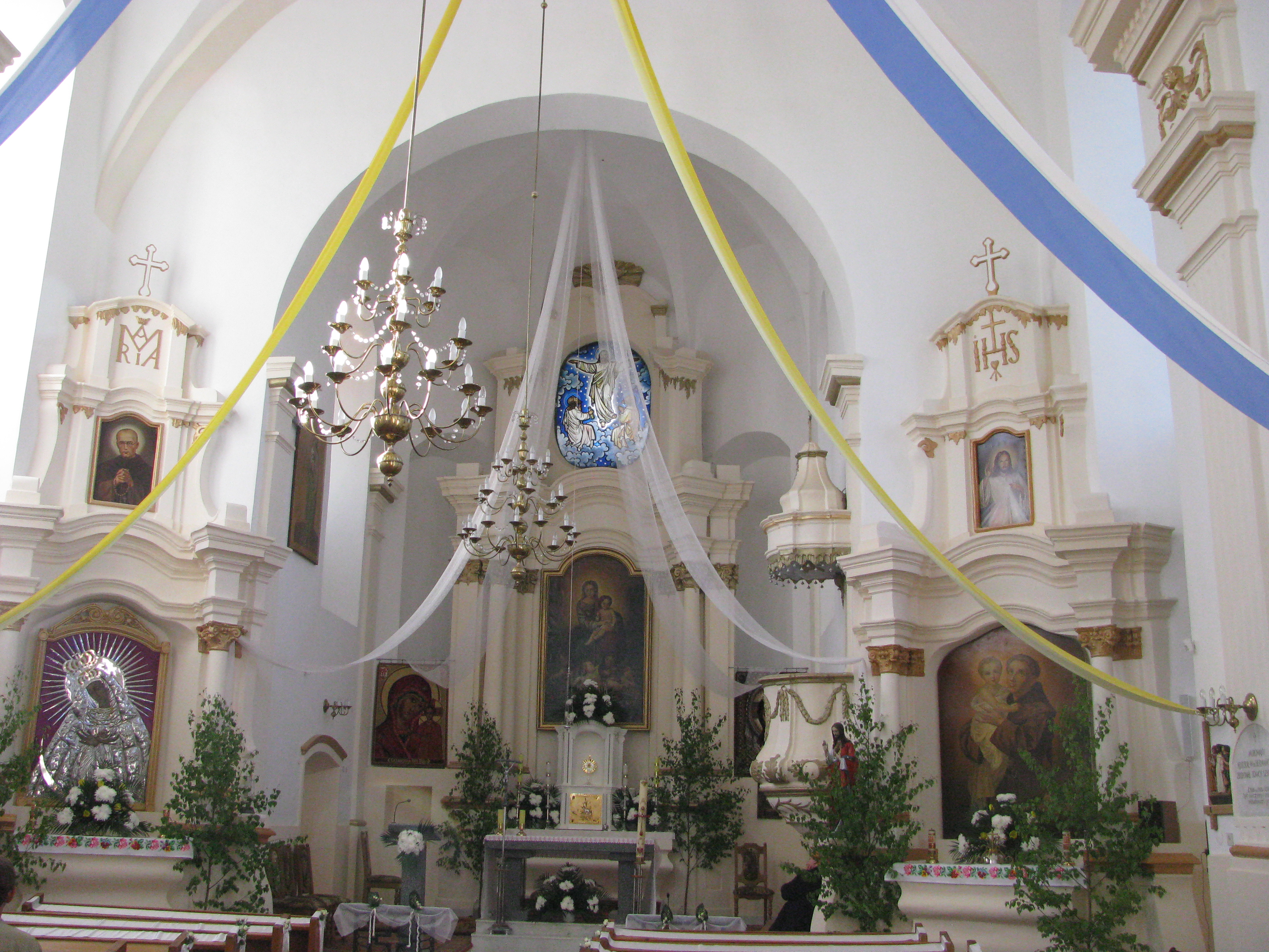 Беларуская (тарашкевіца): Благавешчанскі касьцёл. в. Германавічы This is a photo of Belarusian heritage monument. Reference number: 212Г000833 ( WLM)